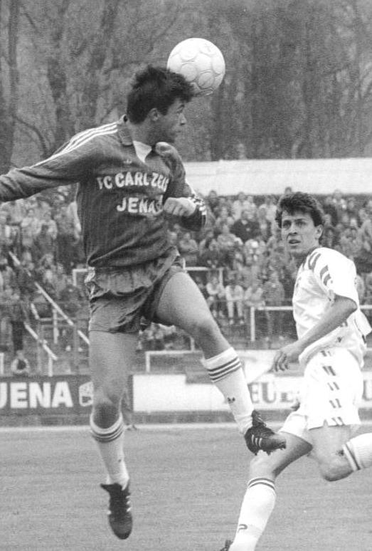 ADN-Kasper-7.4.90-Jena: Fußball-Oberliga-23. Spieltag FC Carl Zeiss Jena - FC Berlin 1:1- Zweikampf zwischen dem Jenanser Bürger und dem Berliner Küttner (r) in der Partie, die mehrfach kurz vor dem Abbruch stand, weil mitgereiste Berliner "Fans" sich in einer Weise aufführten, die mit Sport nichts mehr zu tun hat.